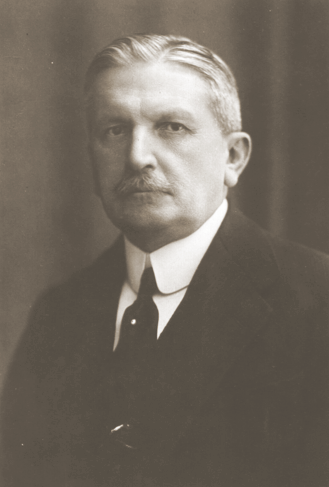 Henryk Grohman, łódzki fabrykant i przemysłowiec